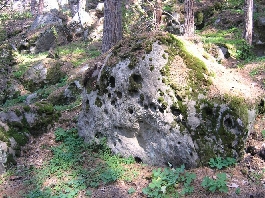 Валуны песчаника на территории памятника природы "Малоусинские нагорные сосняки и дубравы".